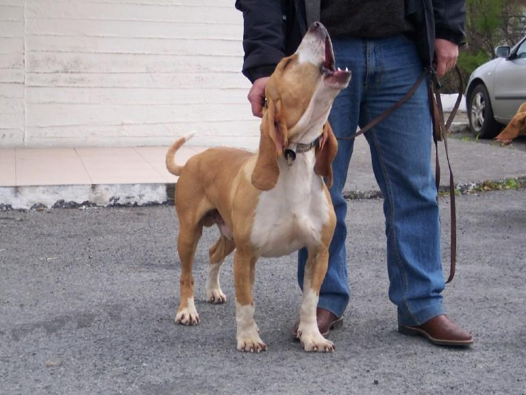 Angoi, sabueso español propiedad de la cuadrilla Os Novos de A Fonsagrada (Lugo)